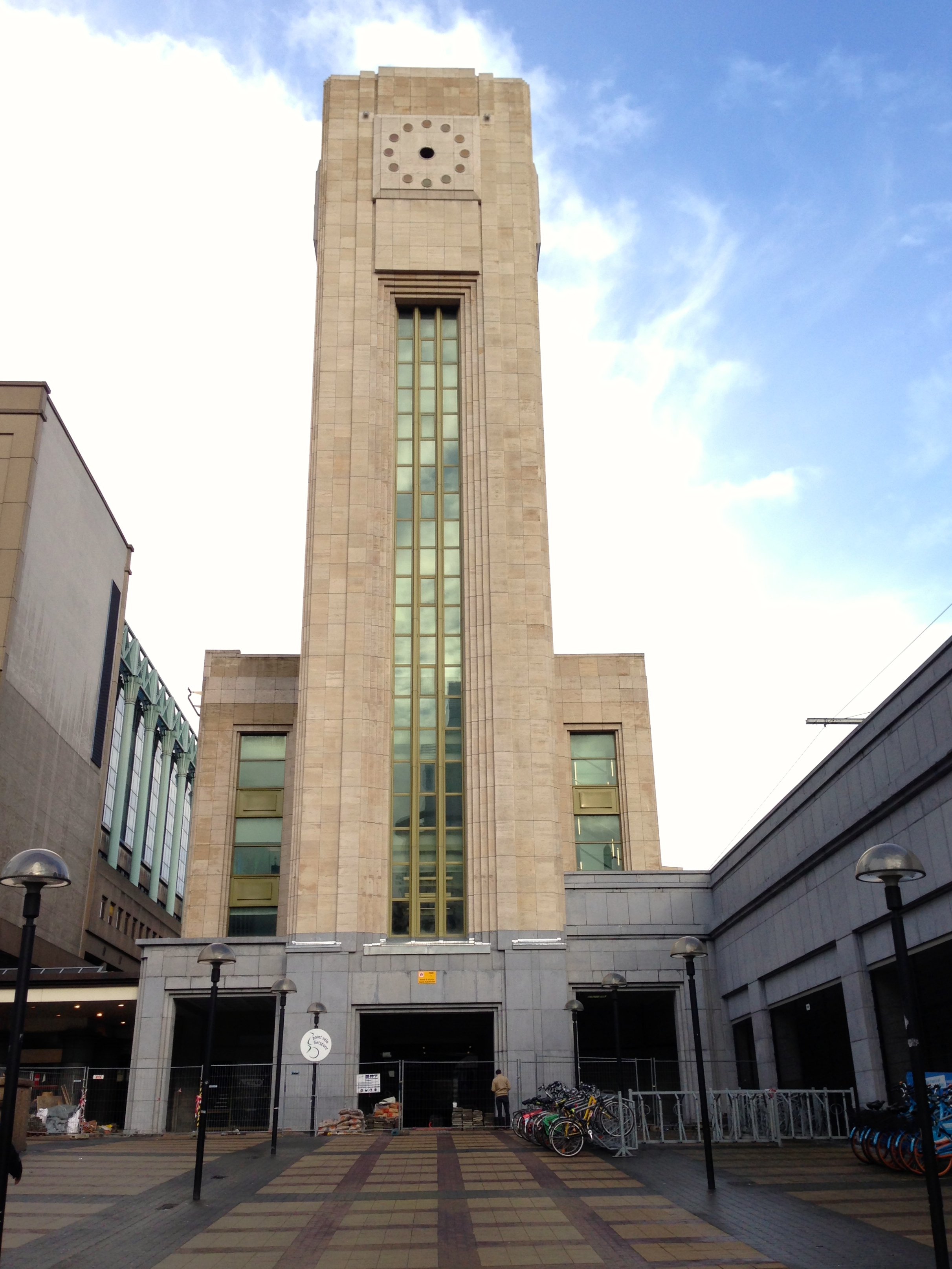 Brussels Gare du Nord Dec 2013 - 1